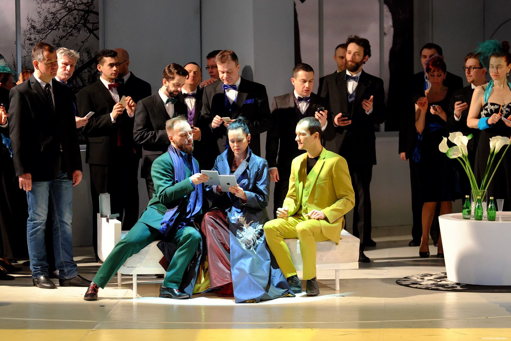 "Traviata", Opera na Zamku w Szczecinie. reż. Michał Znaniecki